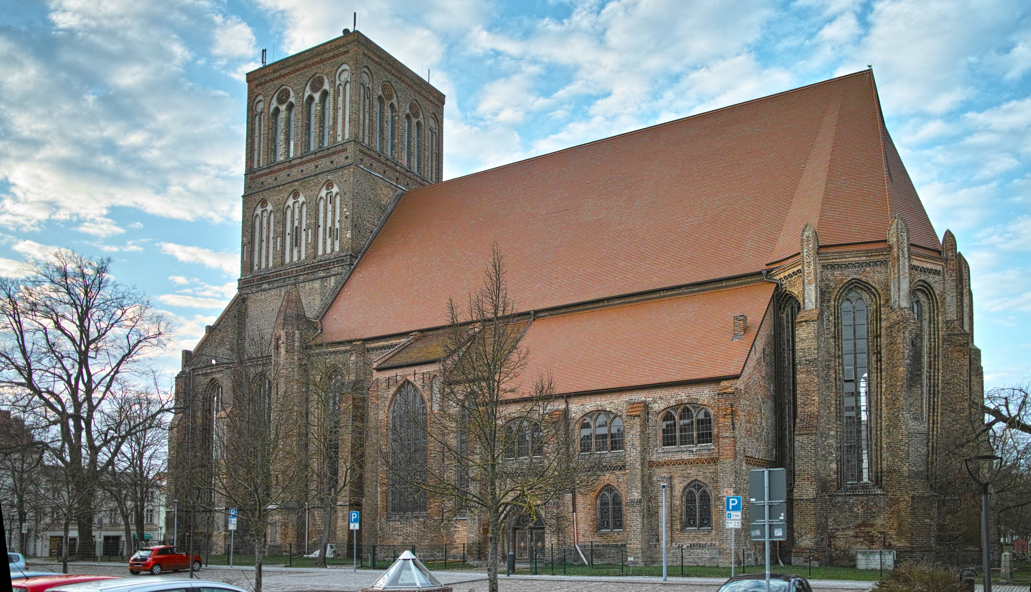 Nikolaikirche Anklam Taufkirche von Otto Lilienthal am 15.04.2018 aktuelle Ansicht mit neuen Fenstern